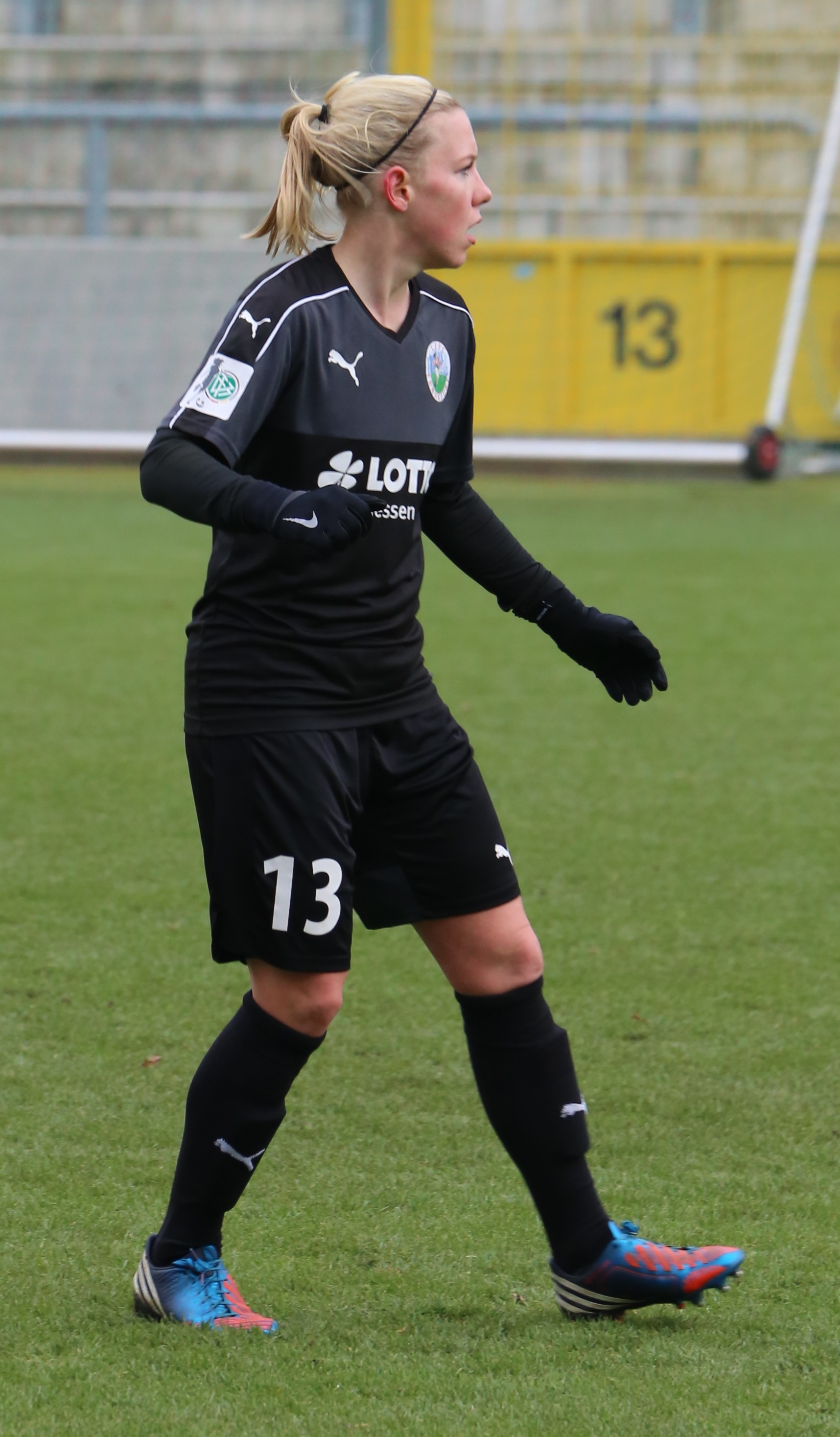 Marith Prießen (1. FFC Frankfurt) beim Frauen-Bundesliga-Spiel FC Bayern München gegen 1. FFC Frankfurt am 13. November 2016 im Stadion an der Grünwalder Straße, München (Ergebnis war 1:0).